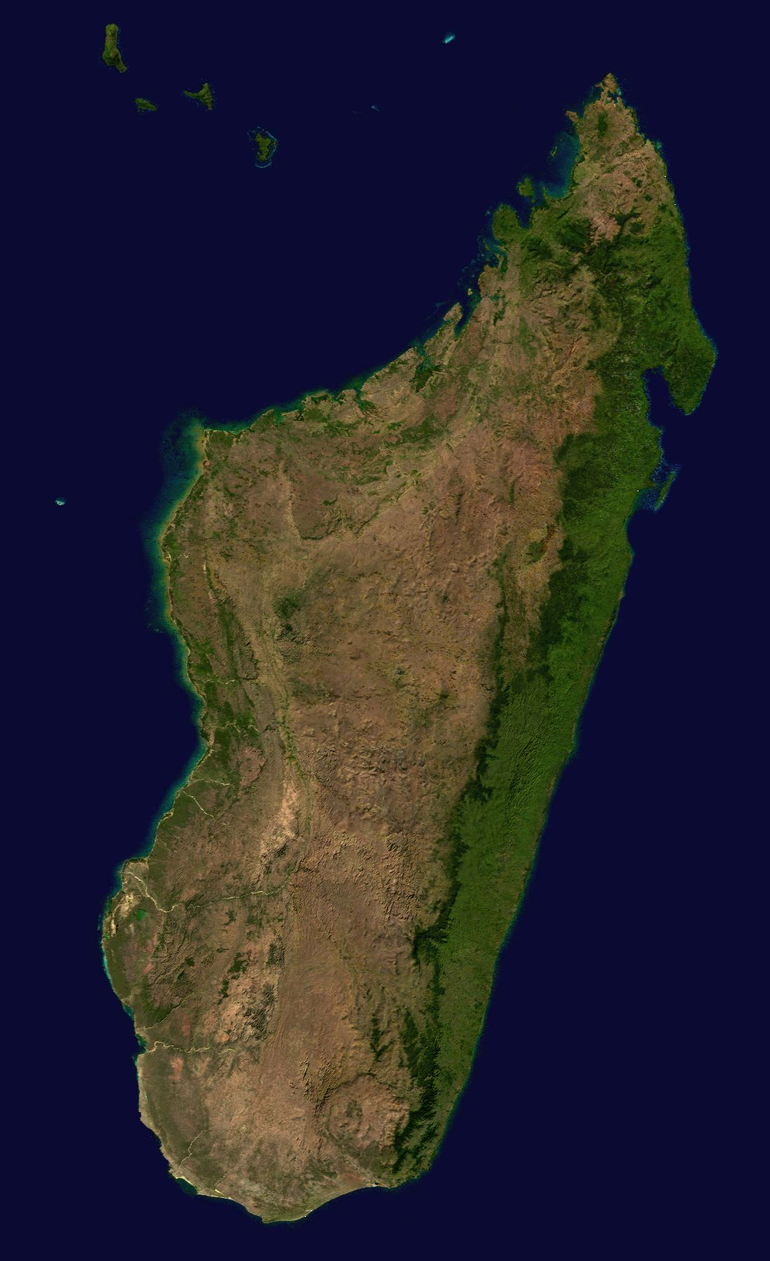 Madagaskar